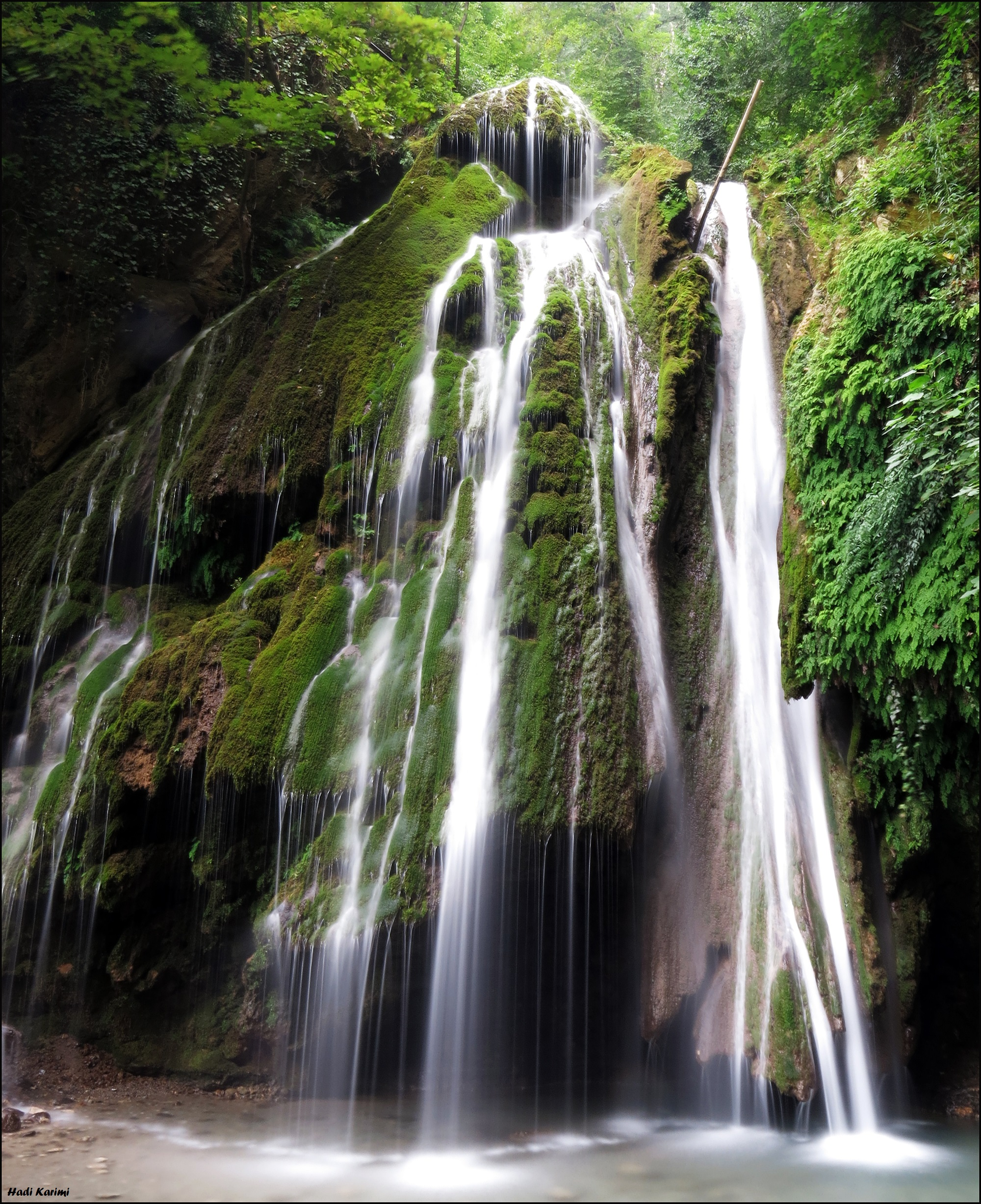 Kaboudval waterfall آبشار کبودوال